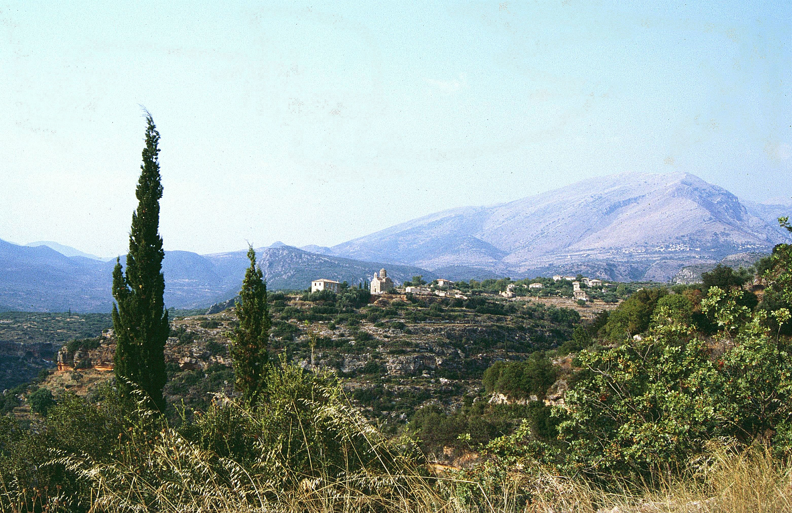 Peloponnes: Mani